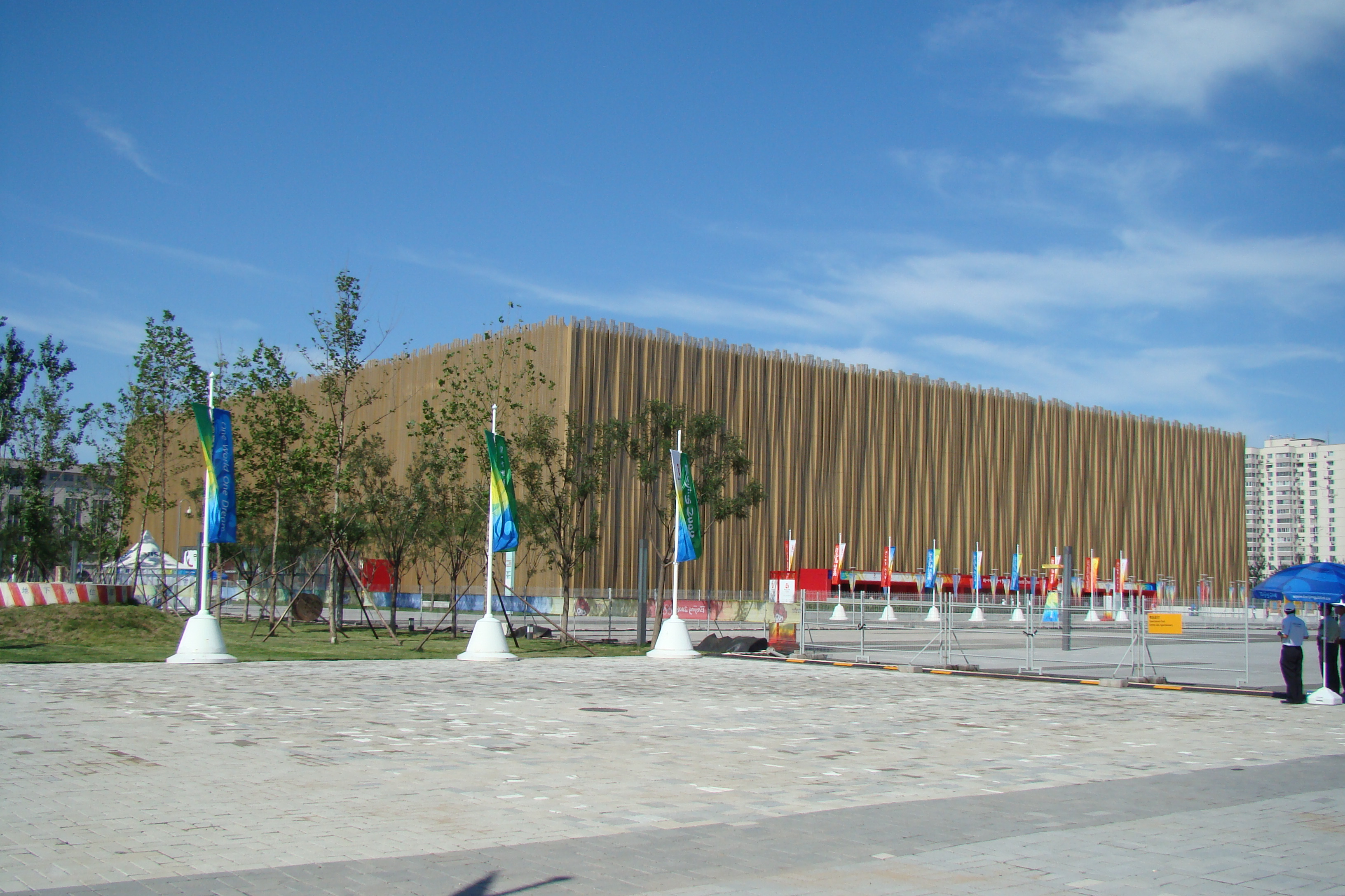 北京五棵松蓝球场